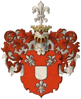 Wahleni suguvõsa aadlivapp